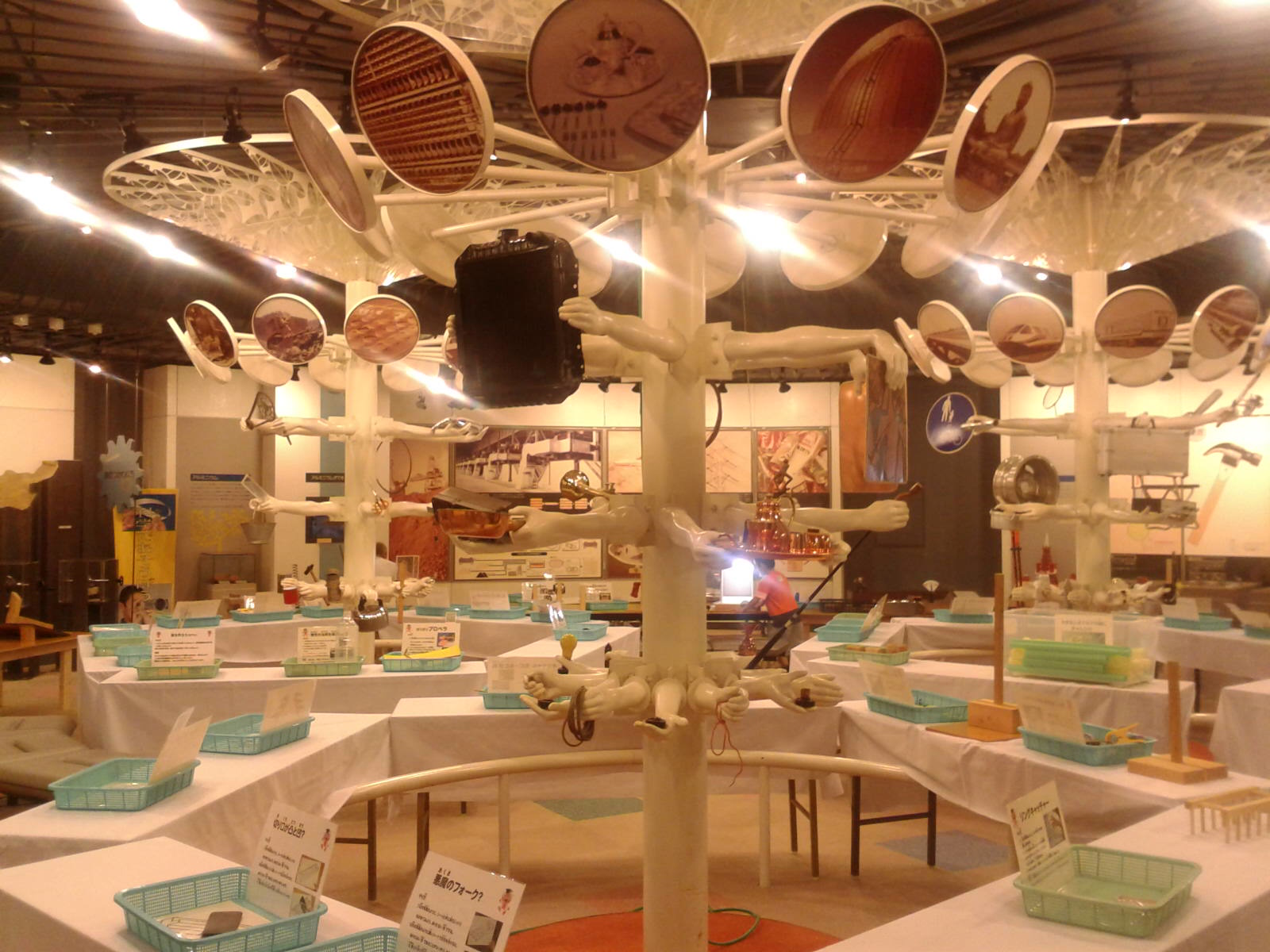 豊橋市地下資源館 内部展示